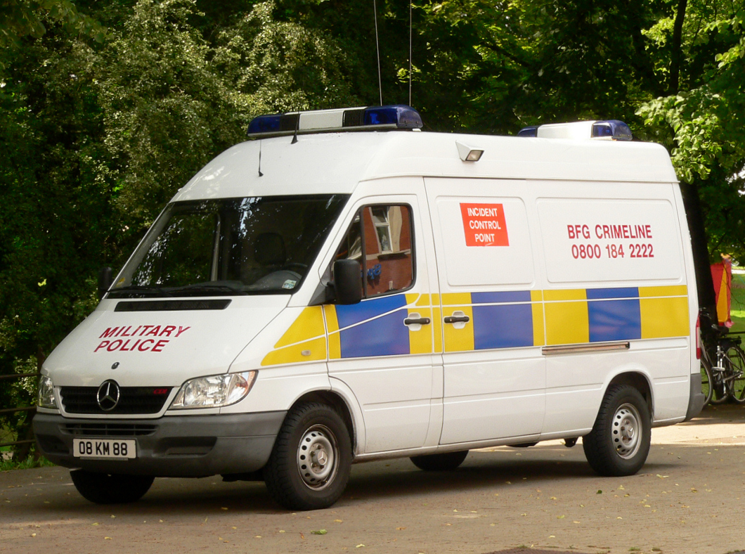 Military police in Germany